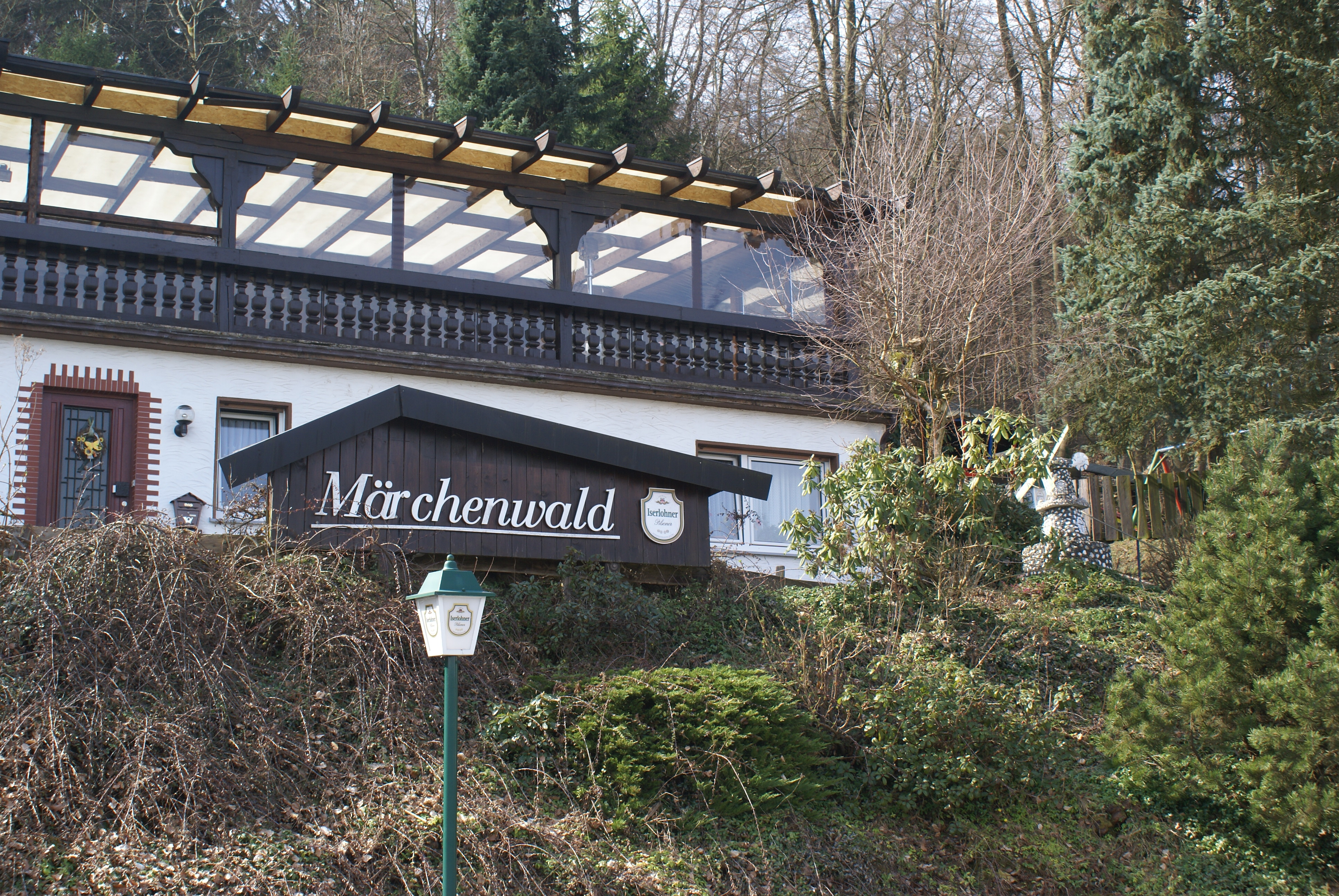 Märchenwald Brockhausen